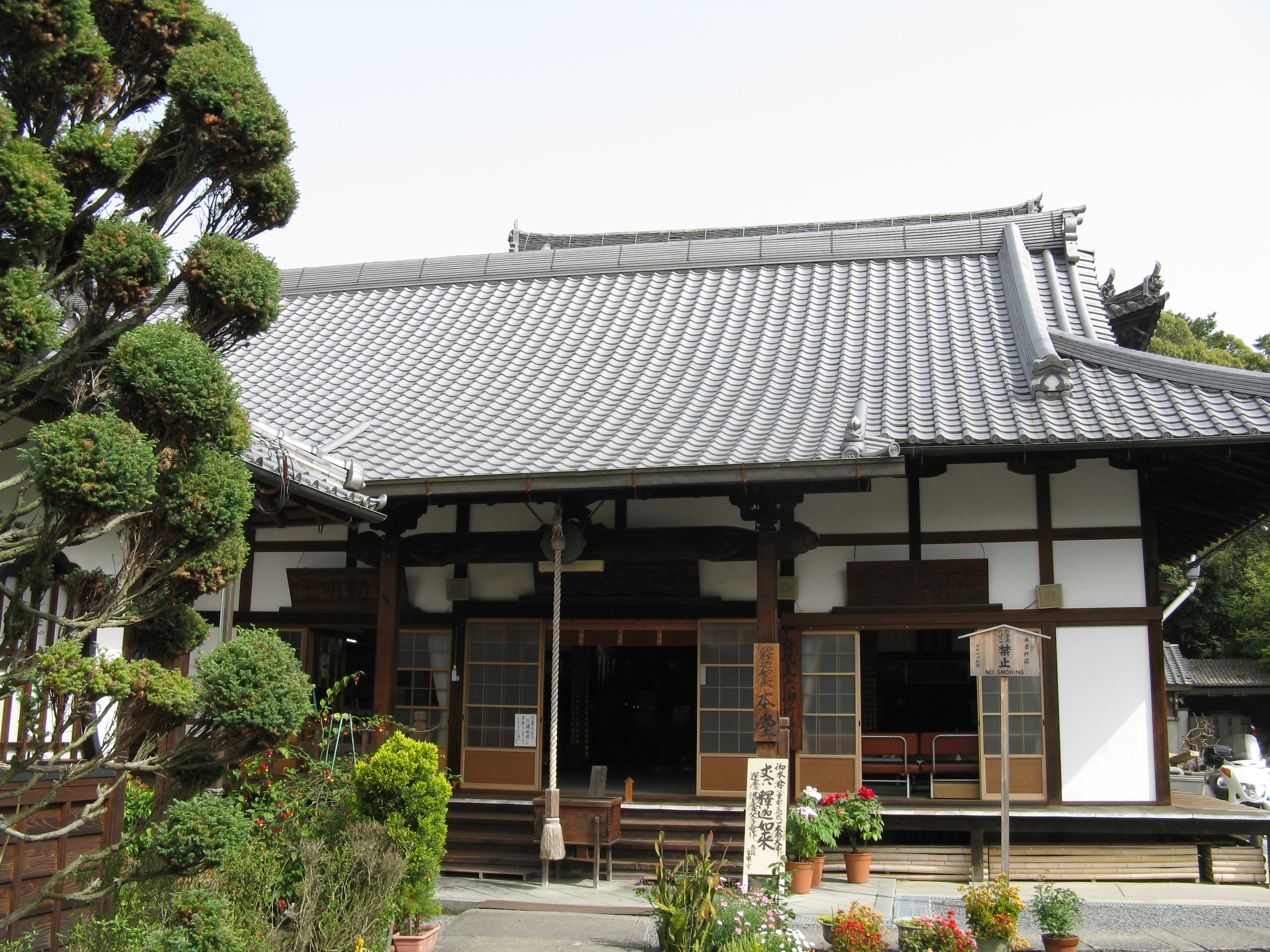 戒光寺 本堂